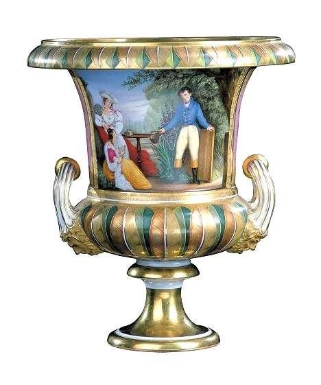 Vaso a cratere con la raffigurazione di una partenza per la caccia.